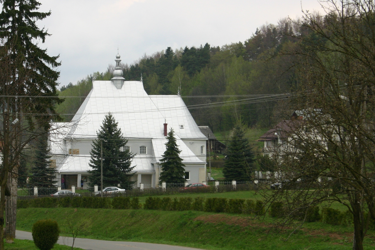 Malinówka (województwo podkarpackie) Object location49° 41′ 47″ N, 21° 55′ 35″ E